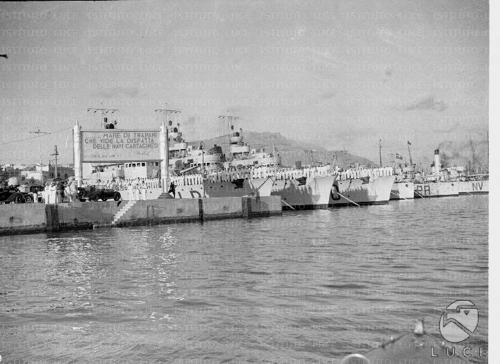 Flotta di navi militari italiane ormeggiata nel porto di Trapani nel 1937